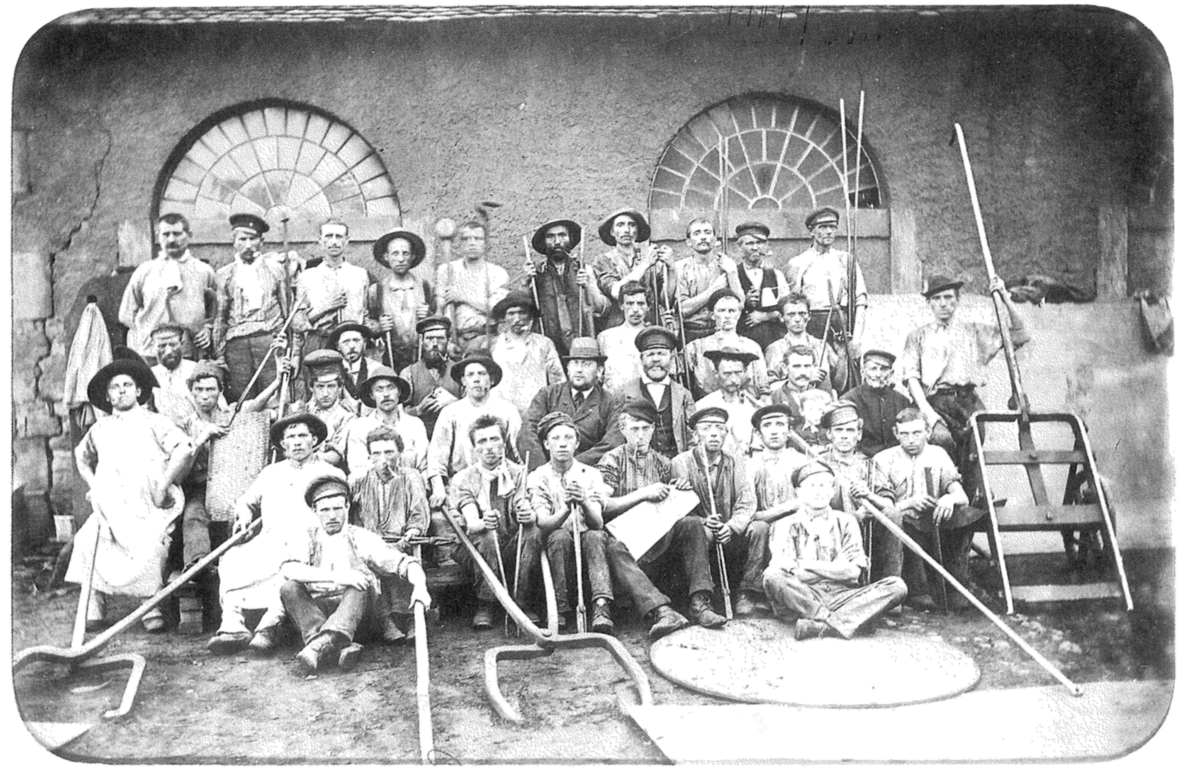 Walzer Dillinger Hütte um 1900